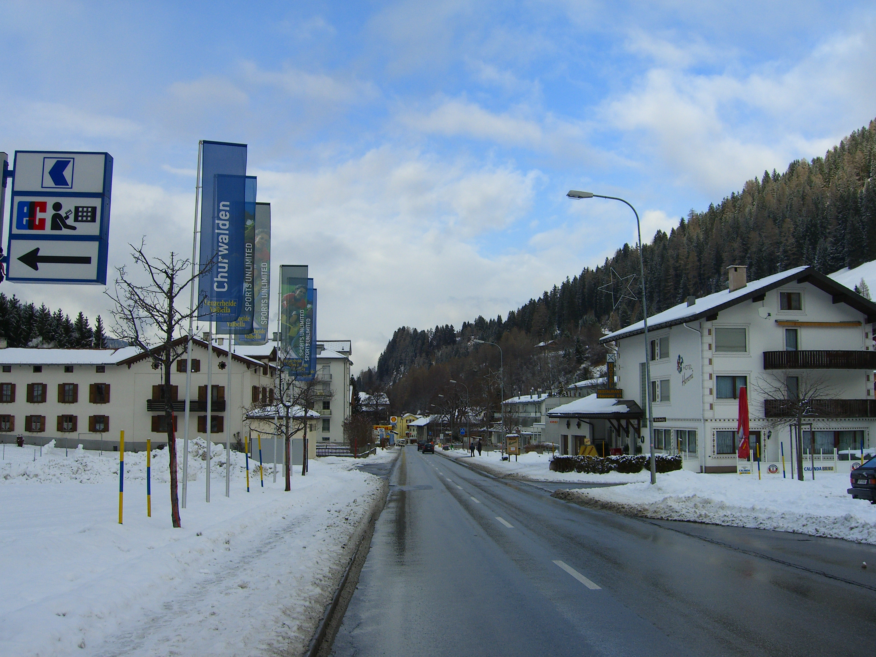 Dorfstrasse in Churwalden Graubünden/Schweiz. Quelle:Bravuogn, Autor:Bravuogn